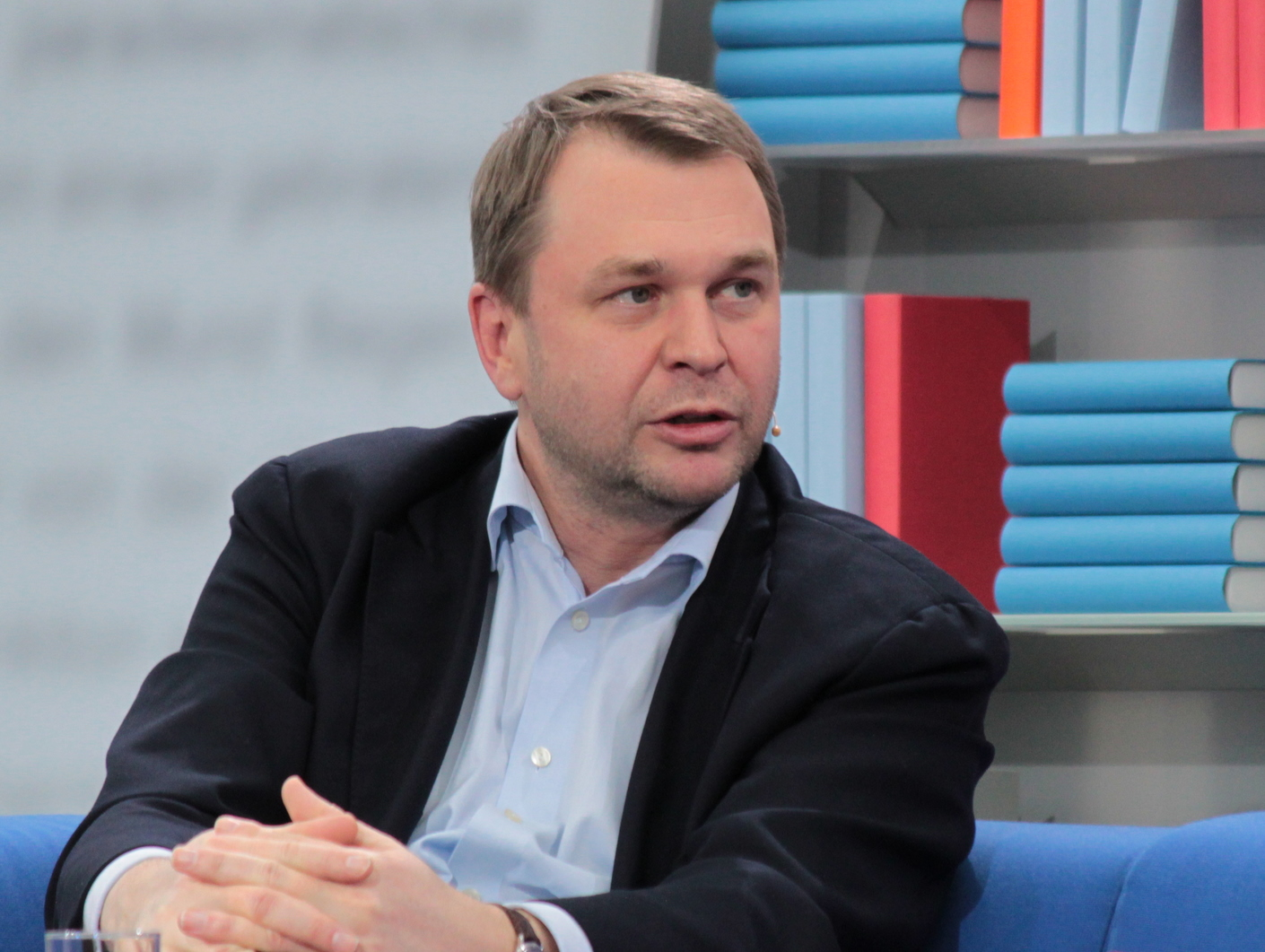 Journalist und Schriftsteller Dirk Kurbjuweit auf der Leipziger Buchmesse 2011. Hornjoserbsce: Nowinar a spisowaćel Dirk Kurbjuweit na Lipšćanskich knižnych wulkowikach.